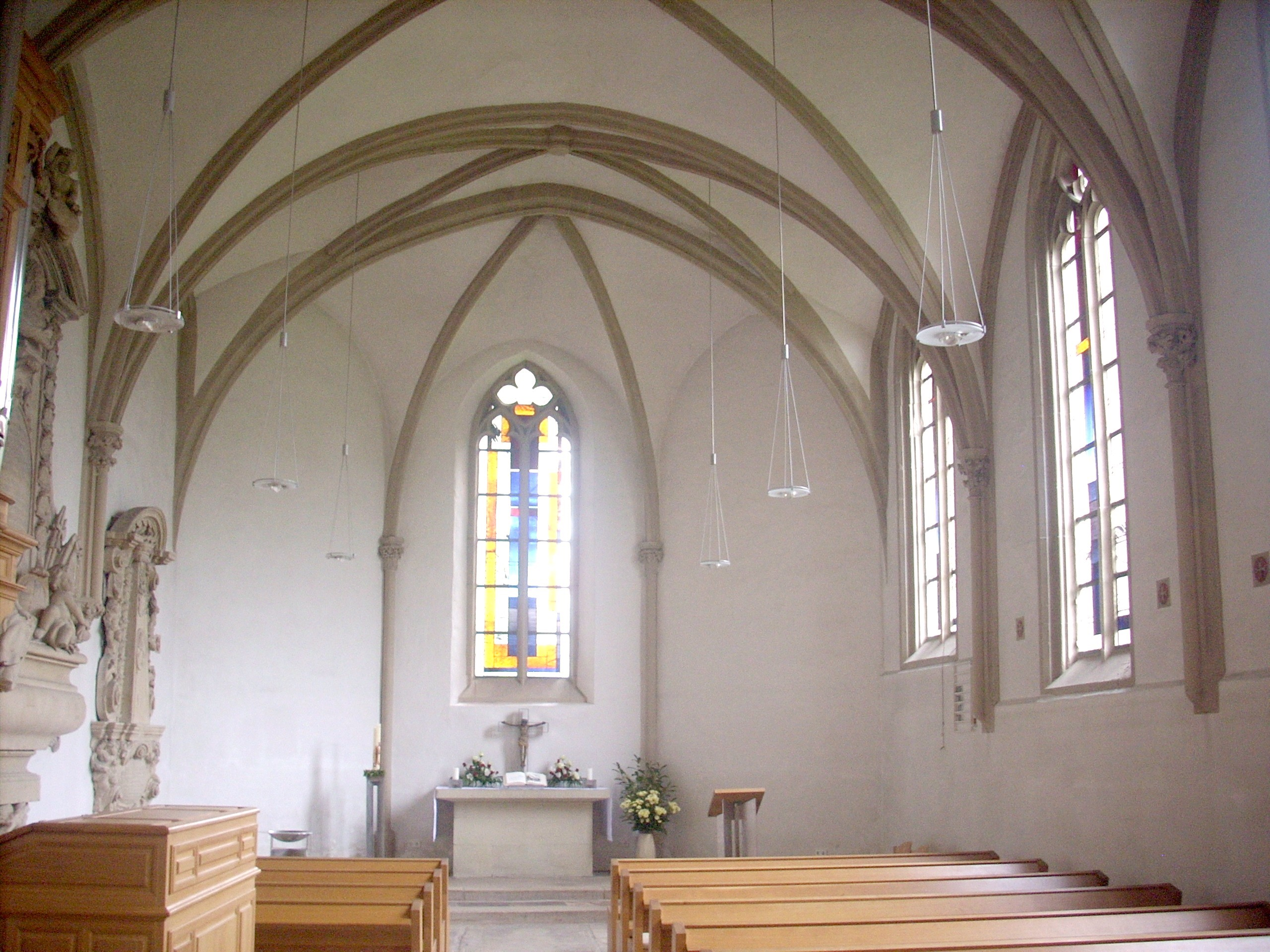 Münster, evang. St.-Johannes-Kapelle, Inneres